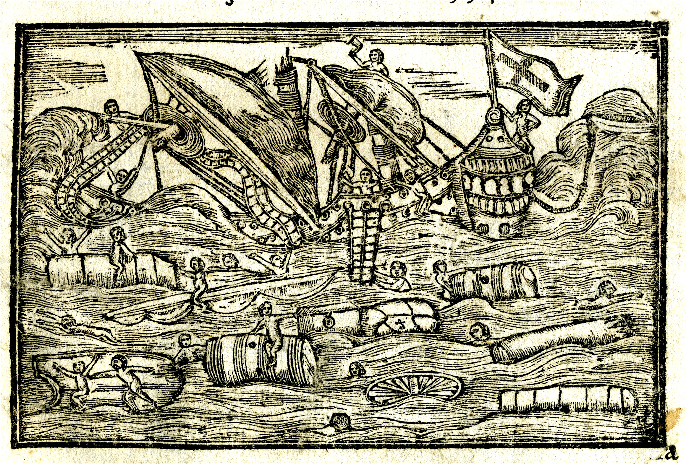 tiré de l'História trágico Maritima, de Bernardo Gomes de Brito. Relation du naufrage de fernão d'Alvares Cabral en 1554